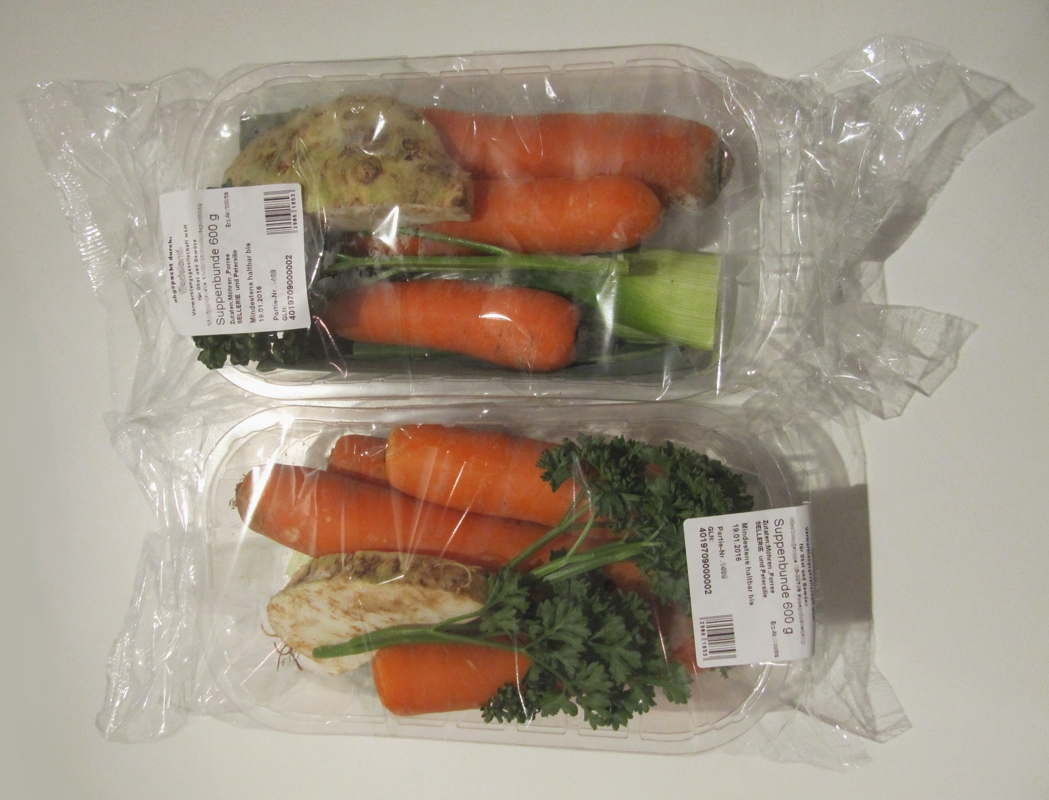 Zwei Pakete Suppengrün aus dem Supermarktregal